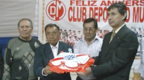 50 años del club, Sr. Alejandro Melchor